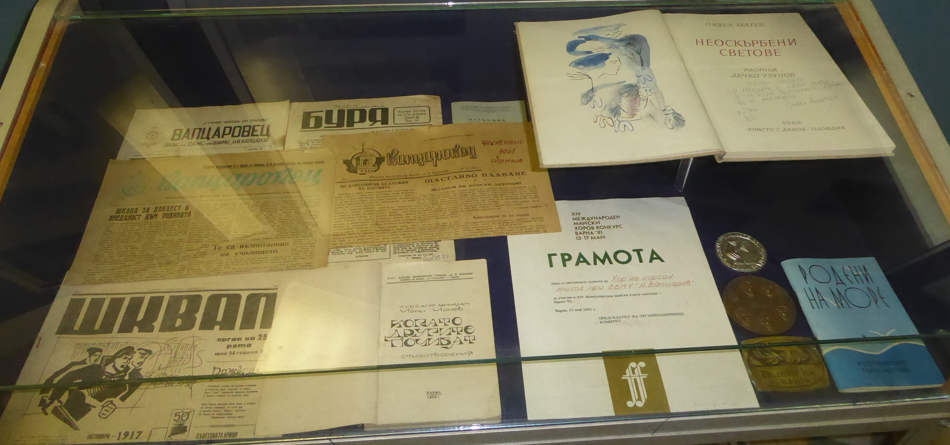 Marineakademie Warna-Auszeichnungen - Bildungsarbeit, Presse